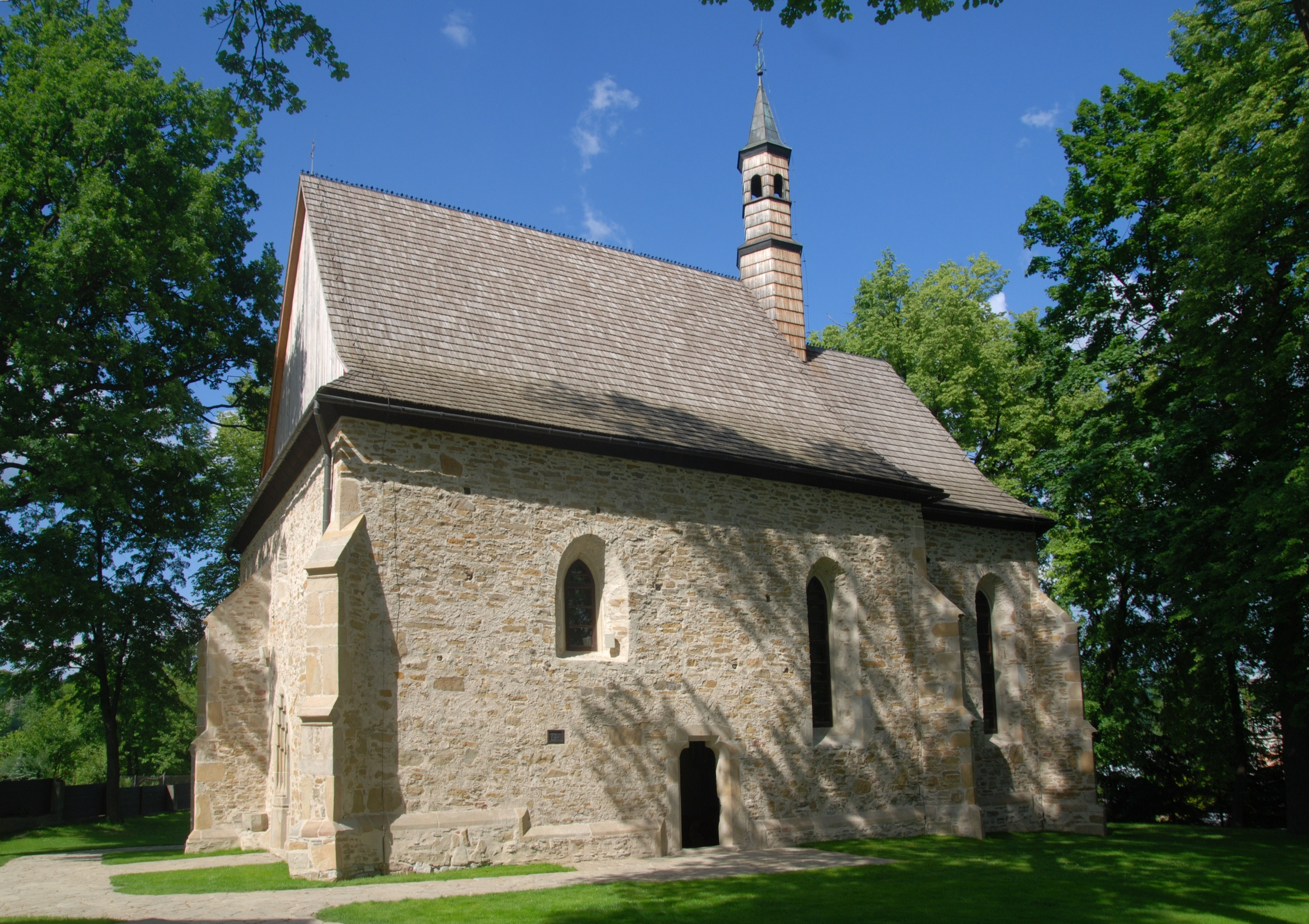 miasto Bobowa